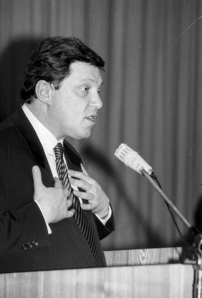 18 февраля 1997 года в культурном центре "Славич" выступил Григорий Алексеевич Явлинский. В президиуме были Елена Борисовна Мизулина, Евгений Алексеевич Мельник, Иван Филиппович Анюховский. На снимке: выступает Григорий Алексеевич Явлинский.